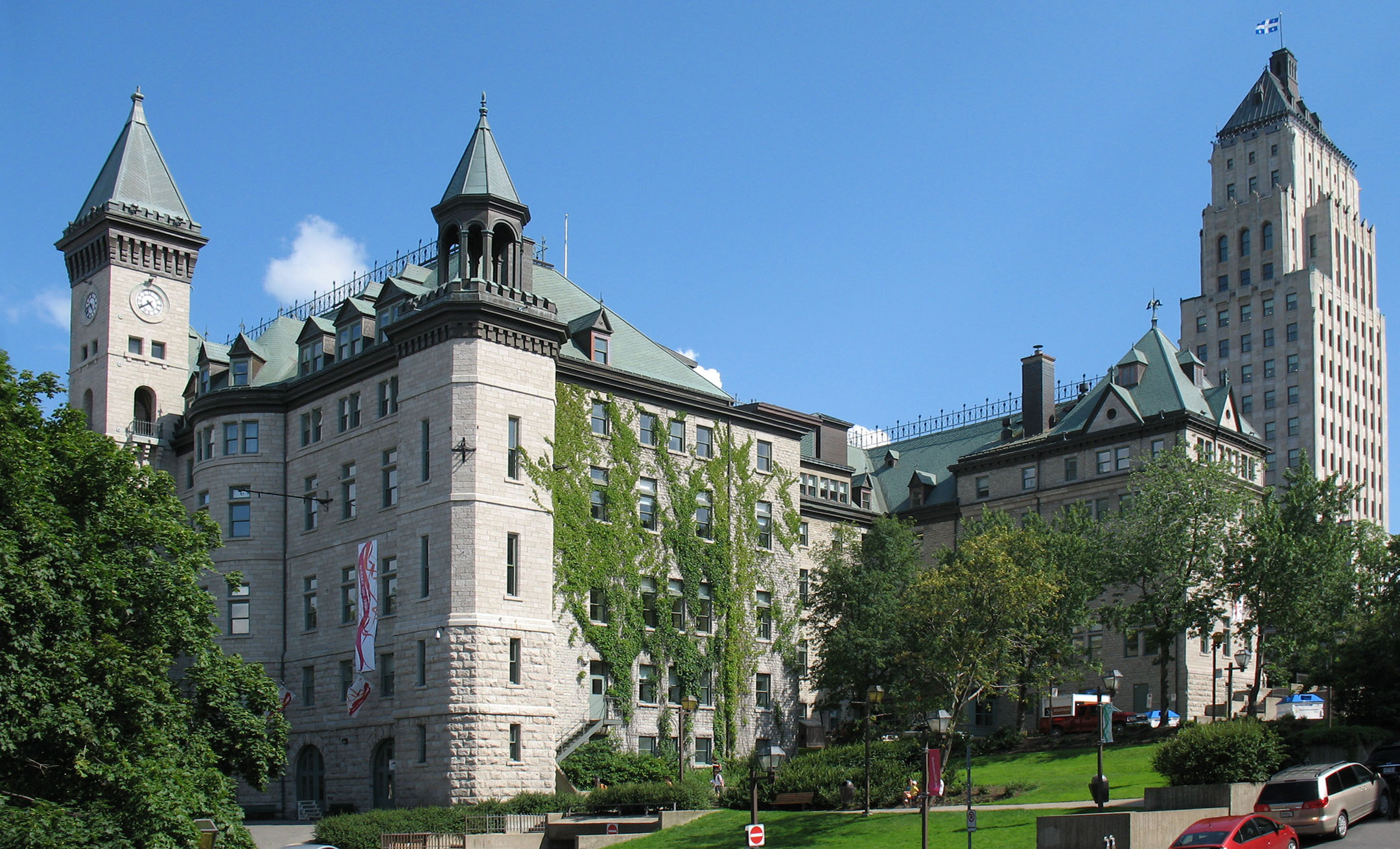 Hôtel de ville de Québec et l'Édifice Price, en haut, à droite. Ville de Québec, province de Québec. Canada